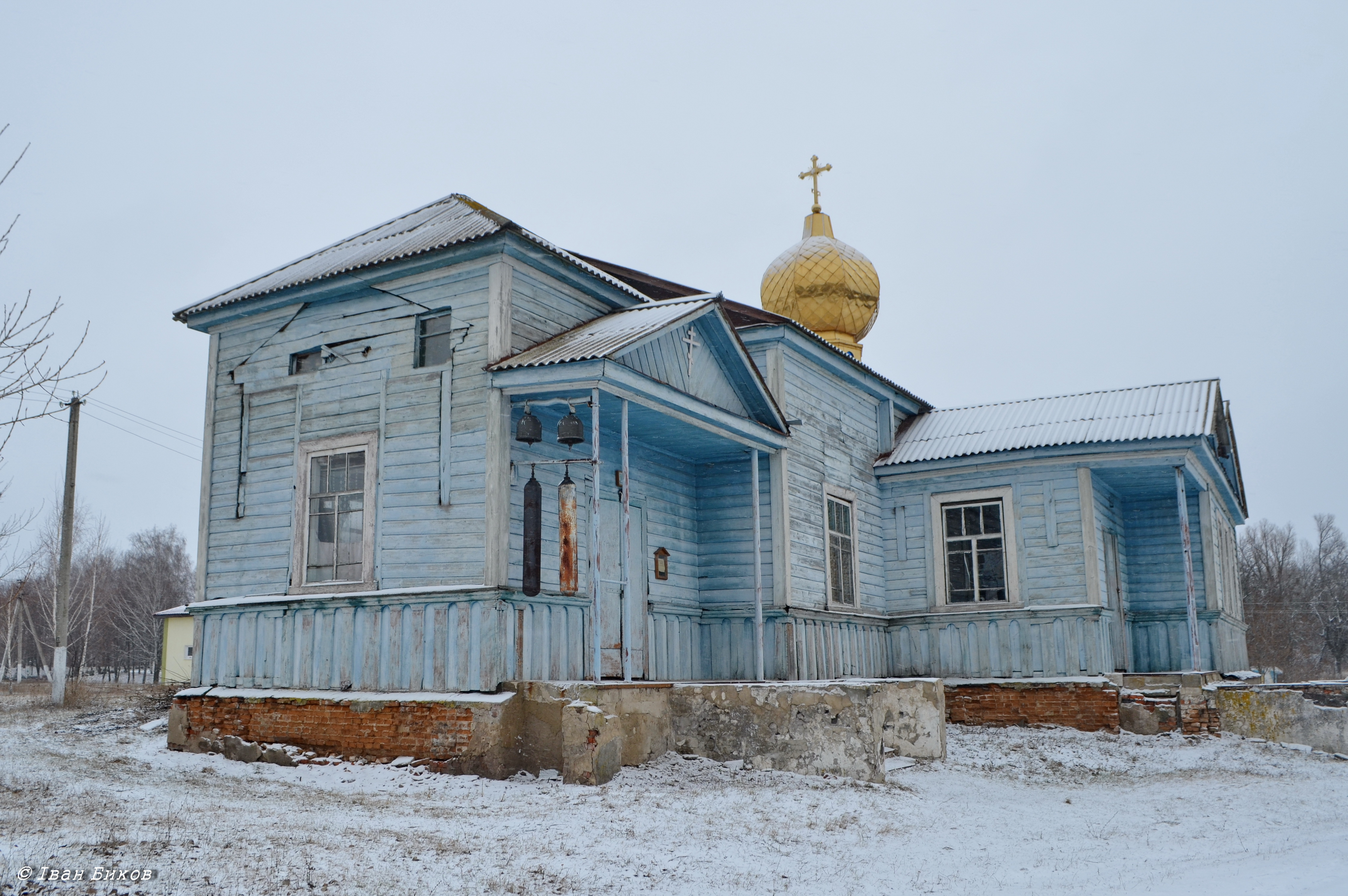 Покровська церква (дер.), село Малий Самбір